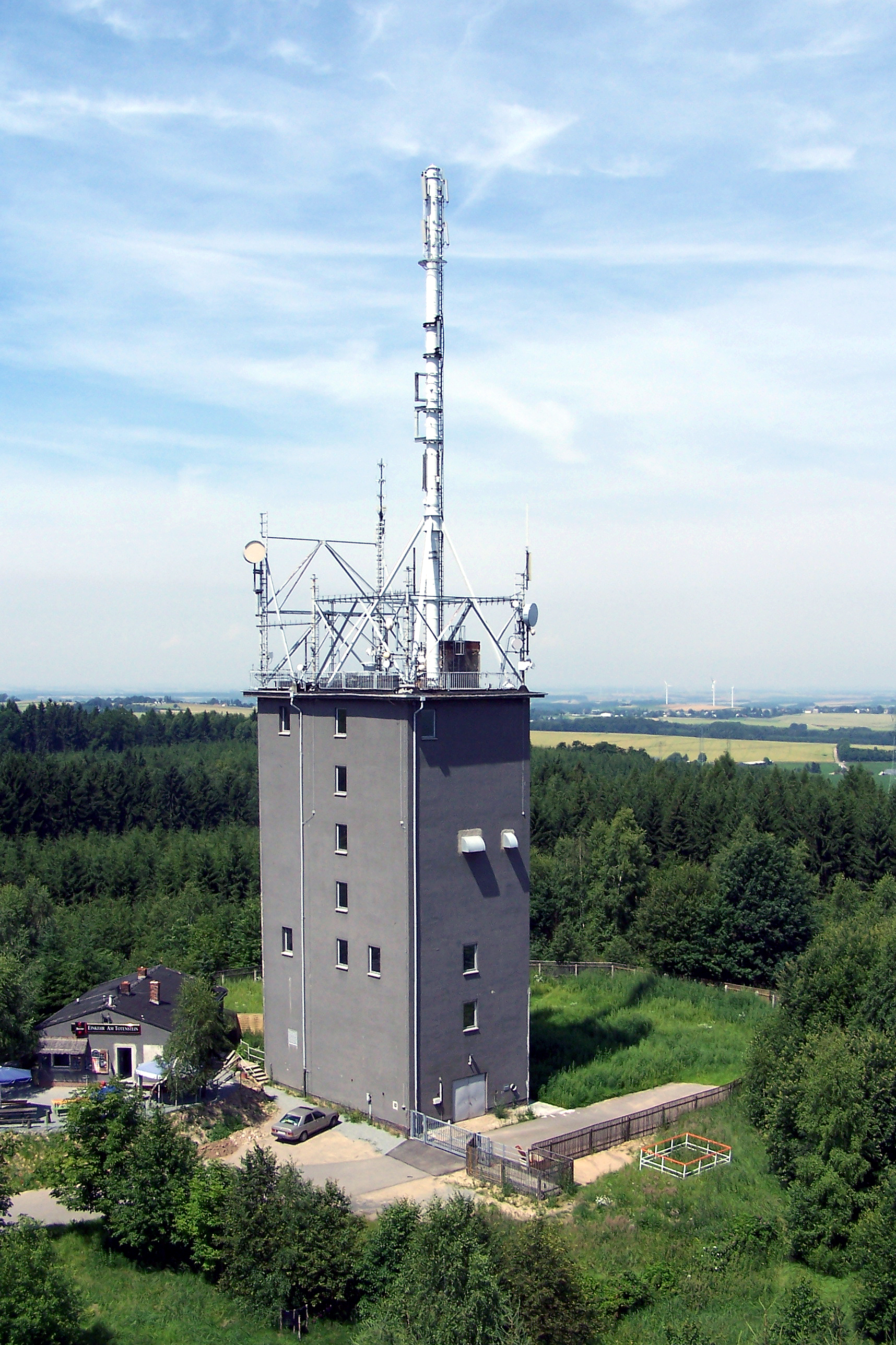 Das Foto zeigt einen Funkturm auf dem Totenstein bei Chemnitz.